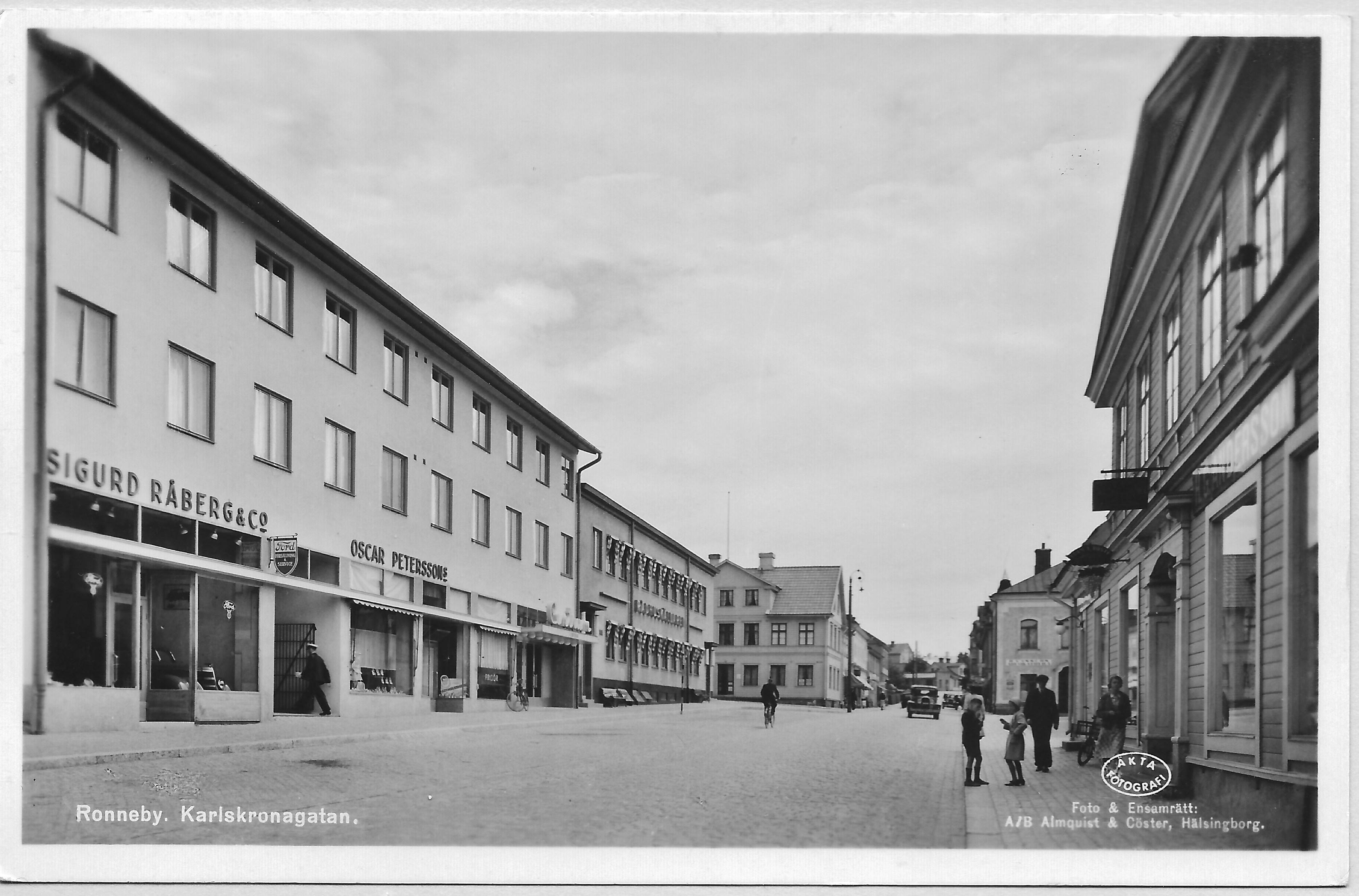 Karlskronagatan fotograferad mot öster cirka 1938. Rådhuskällaren och biografhuset till vänster.